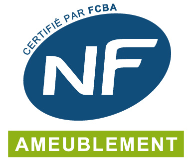 Logo de la marque NF Ameublement